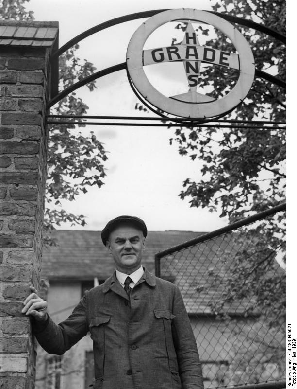 Hans Grade vor seinem Heim 60. Geburtstag von Hans Grade Am 17. Mai begeht der bekannte Flugpionier, Hans Grade, in Borkheide (Mark) seinen 60. Geburtstag. Grade ist einer der bekanntesten deutschen Sportflieger der Vorkriegszeit und beteiligt sich noch heute mit seiner alten Maschine an Flugveranstaltungen. U.B.z.: Hans Grade vor seinem Heim Fot. Mül. 12.5.39 6136-39 Abgebildete Personen: Grade, Hans: Flugpionier, Deutschland